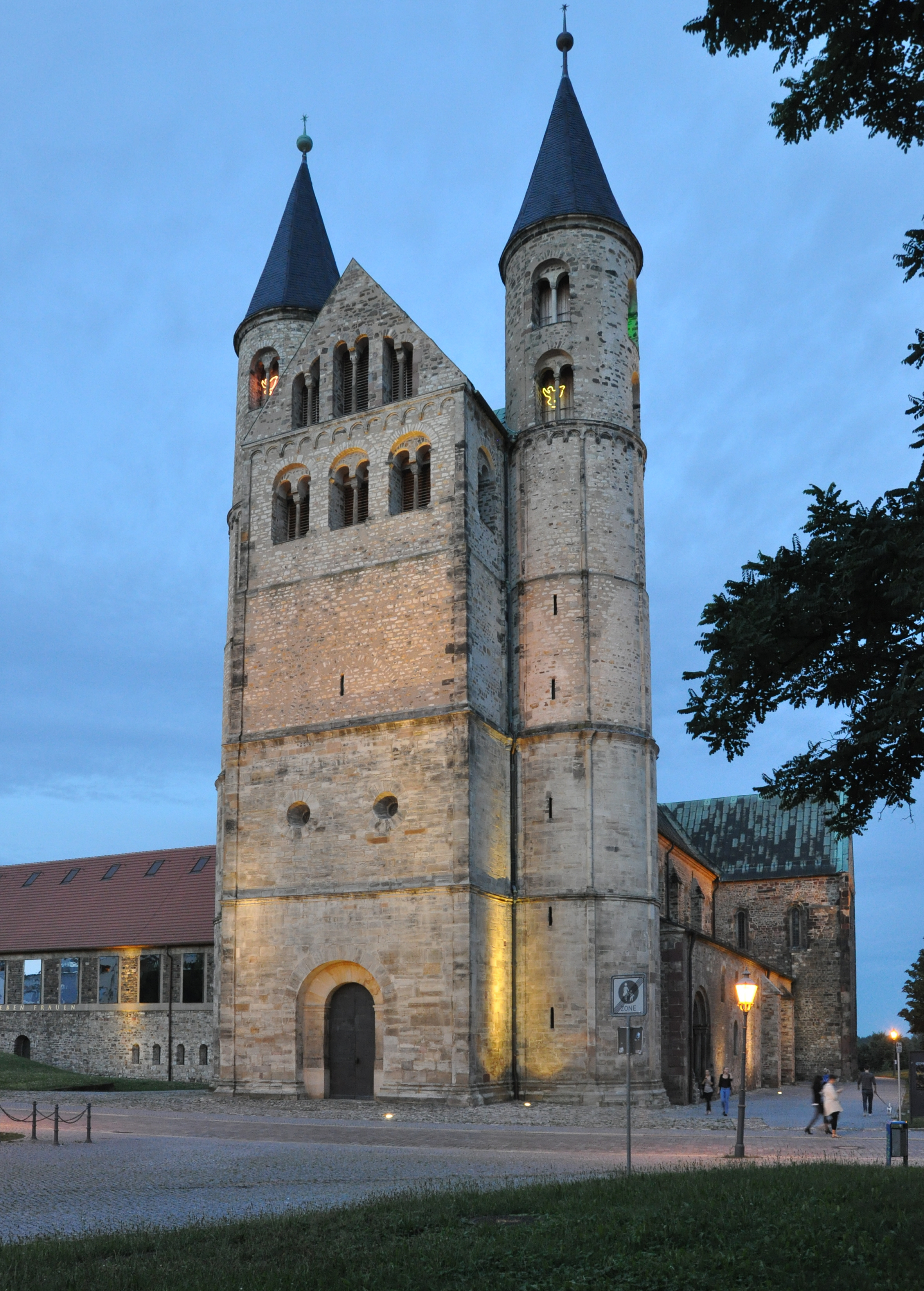 abendliche Ansicht des Westwerkes von Südwesten